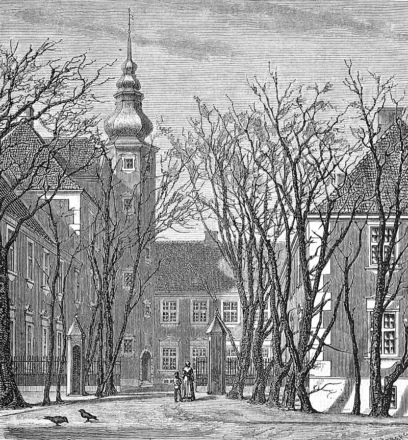 Jægerspris Slot er et slot i Jægerspris ved Fredrikssund, Frederiksborg Amt, Sjælland, Denmark